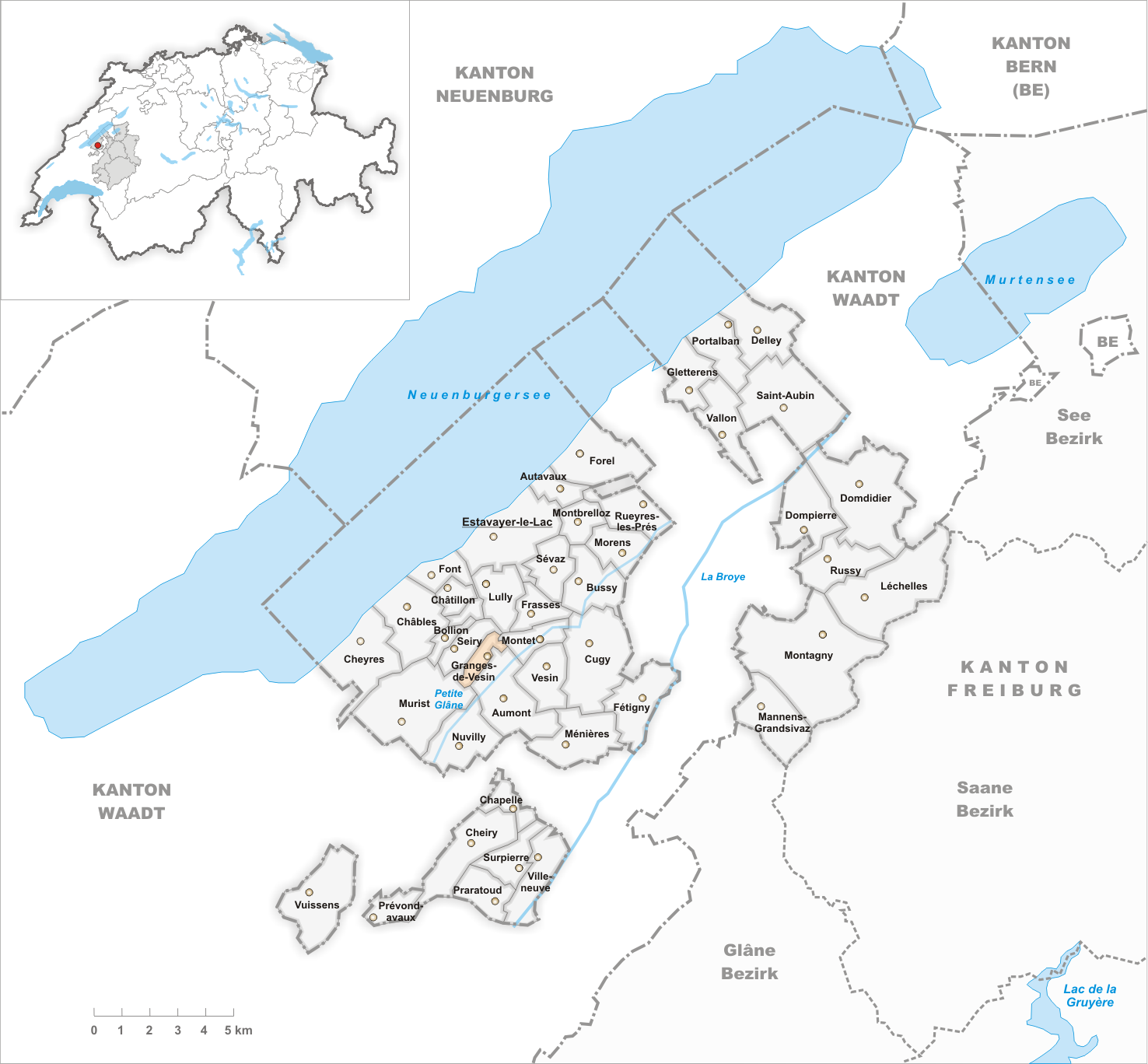 Municipality Granges-de-Vesin Artist: Tschubby